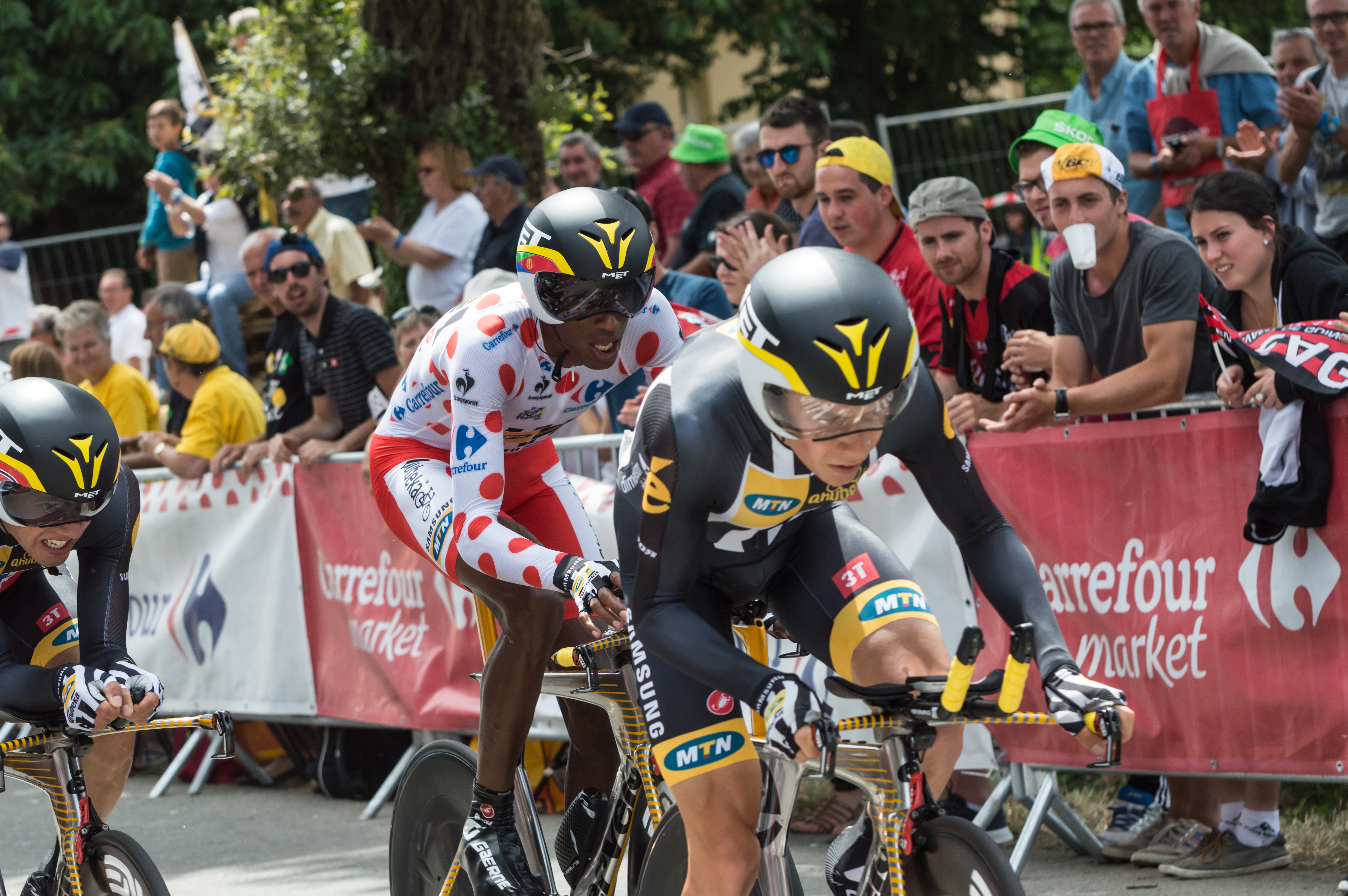 Tour de France 2015 - Maillot à Pois